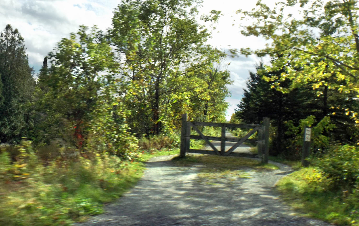 Sentiers de la nature Tomifobia